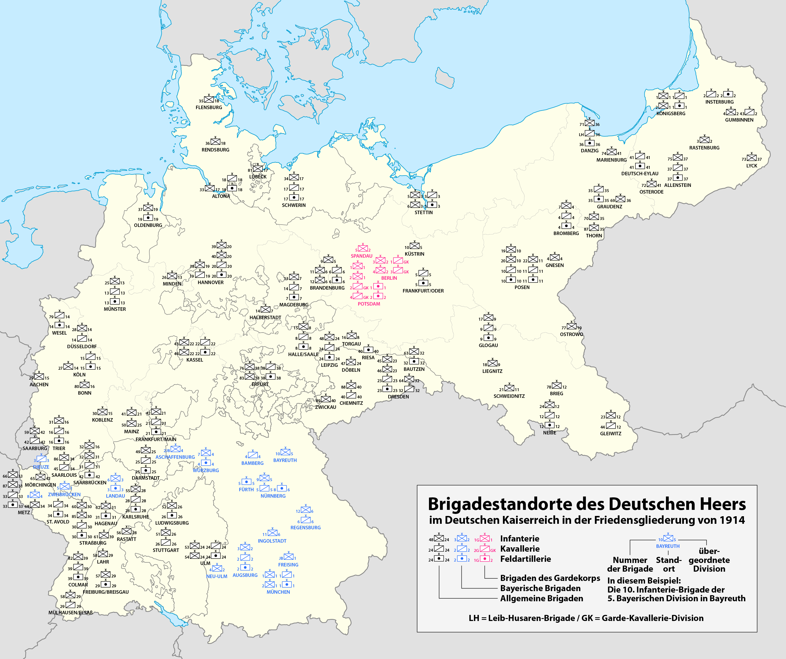 Karte der Brigadestandorte des Deutschen Heers im Deutschen Kaiserreich in der Friedensgliederung von 1914